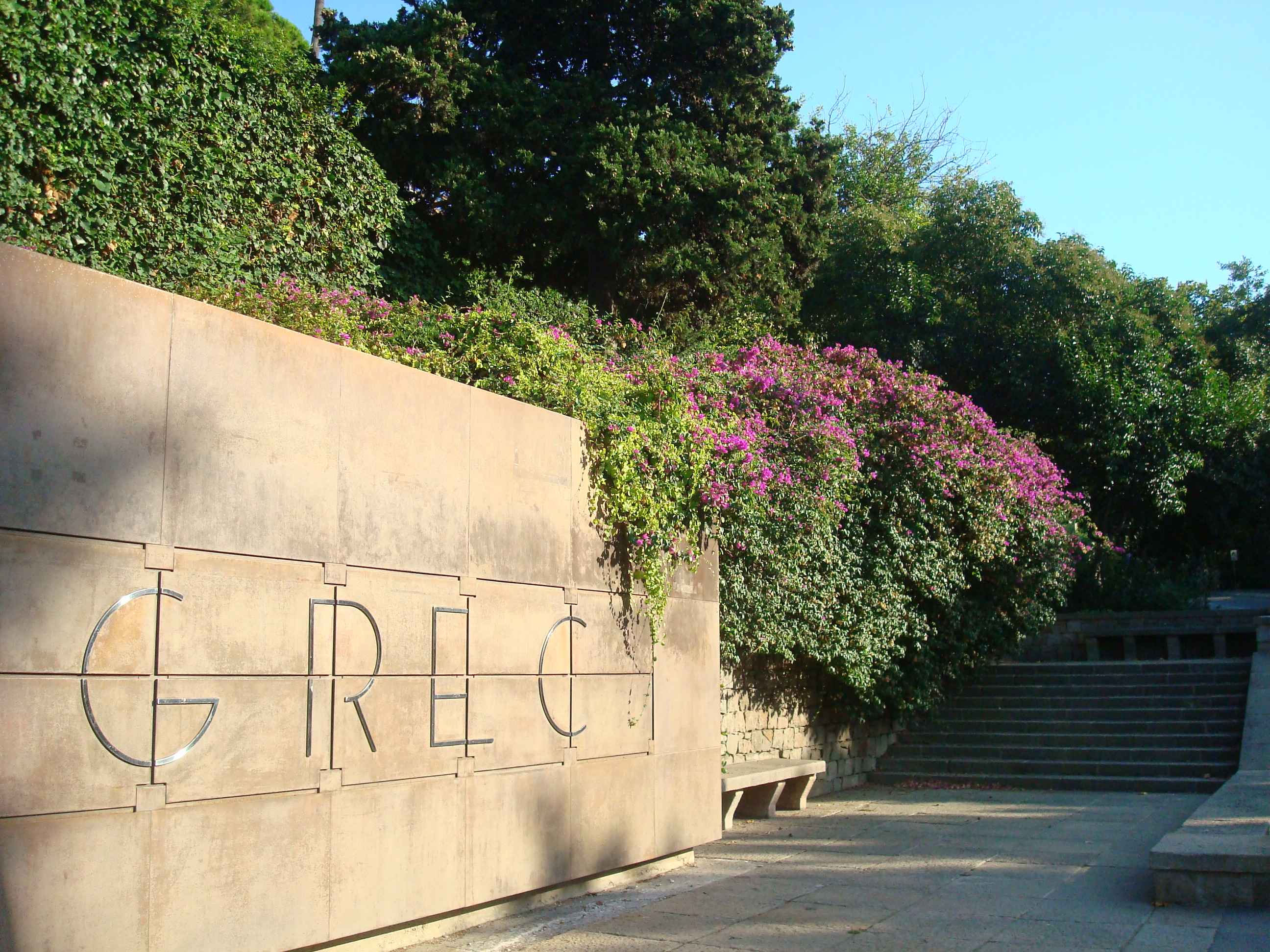 Ingreso del Teatre Grec en el Montjuic Barcelona, Cataluña, España